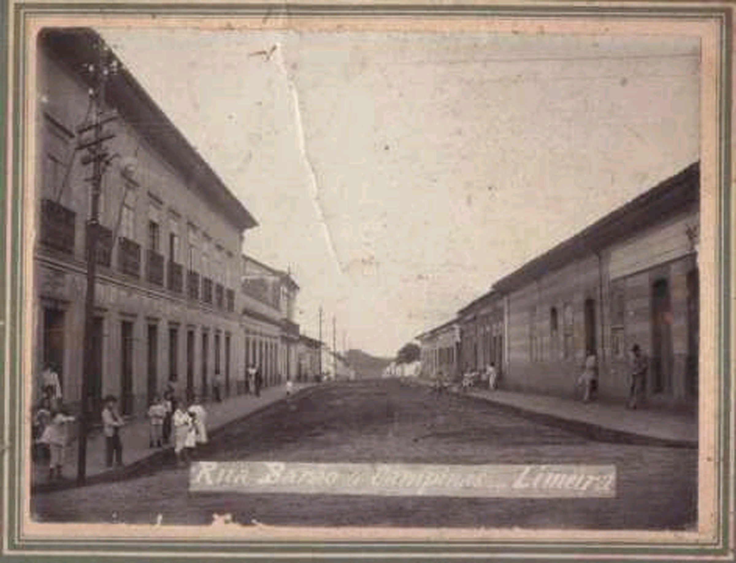 Rua Barão de Campinas, vista da esquina com a Rua Santa Cruz, Limeira, início do século XX (c. 1910)